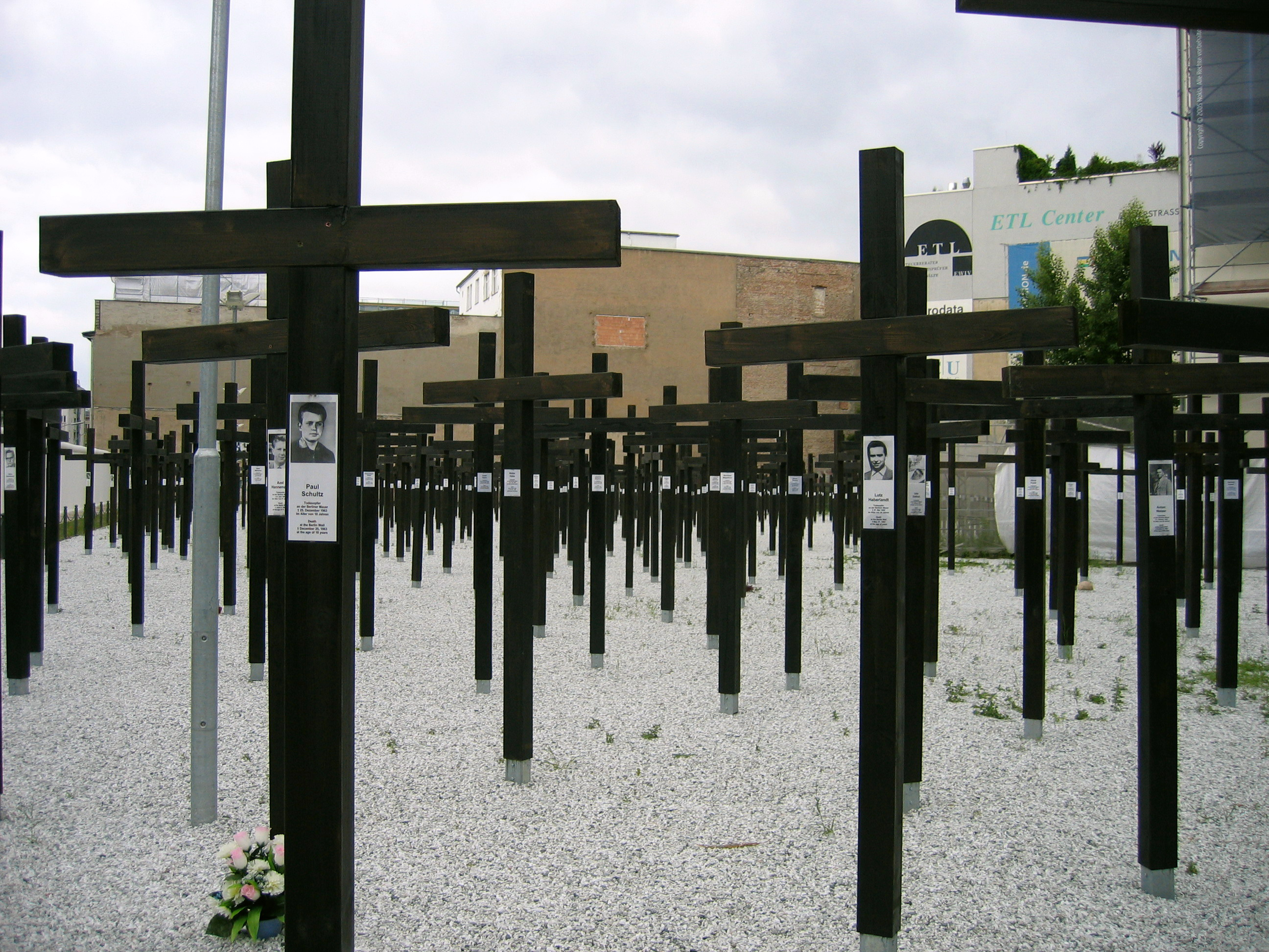 Mauerkreuz-Mahnmal am Checkpoint Charlie